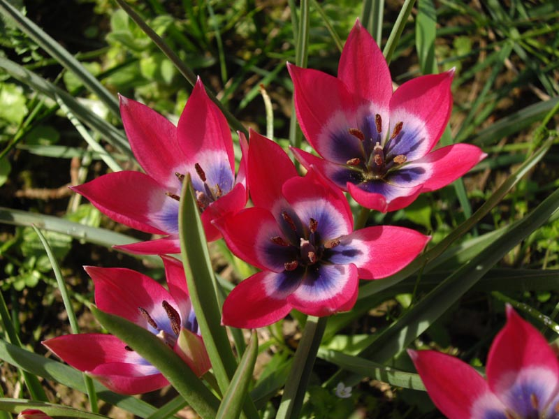 Tulipa 'Little Beauty'